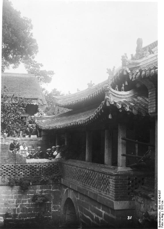 China, Tsingtau China, Tsingtau um 1912 [China, Tsingtau.- Gruppenbild / Matrosen [Fotoalbum: Bilder aus China, von Ob.Matr.Artl. Quinten; Bem.: Originaltitel z.T. inkorrekt